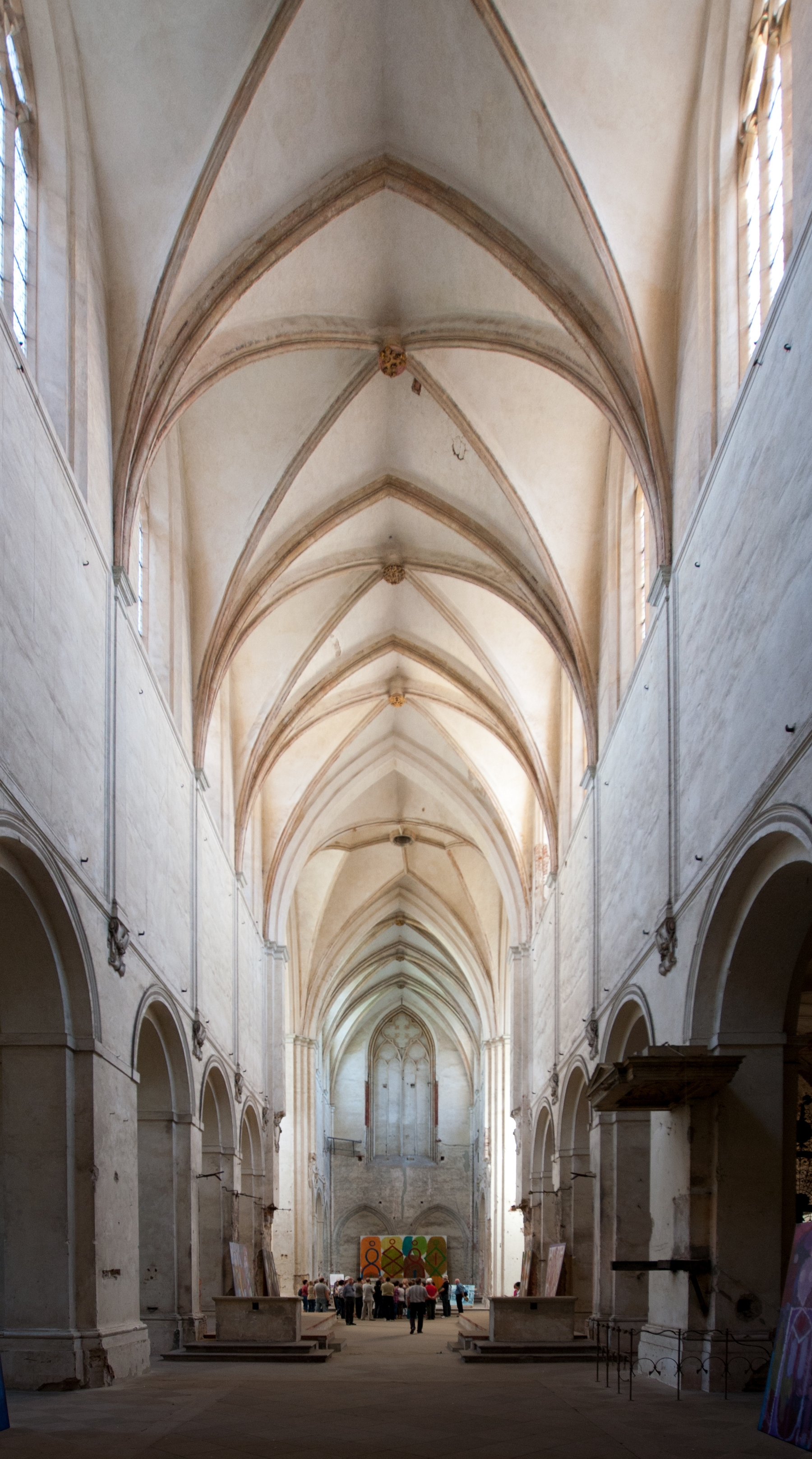 Opactwo cystersów w Lubiążu, nawa główna kościoła klasztornego